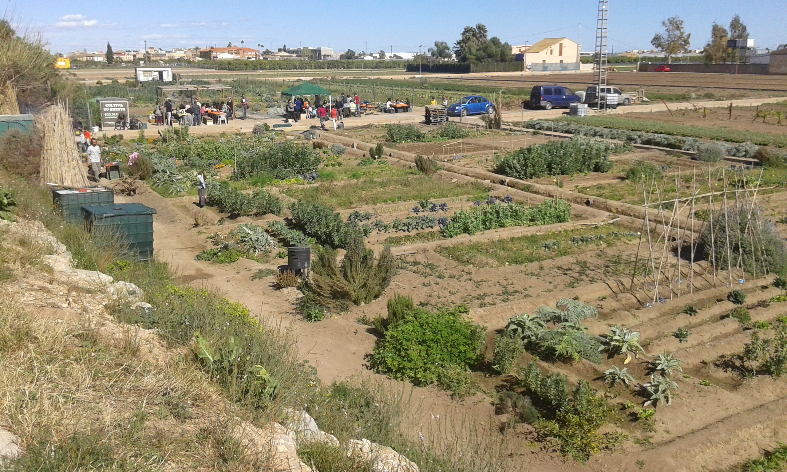 Horts urbans a Meliana vora la Via Xurra